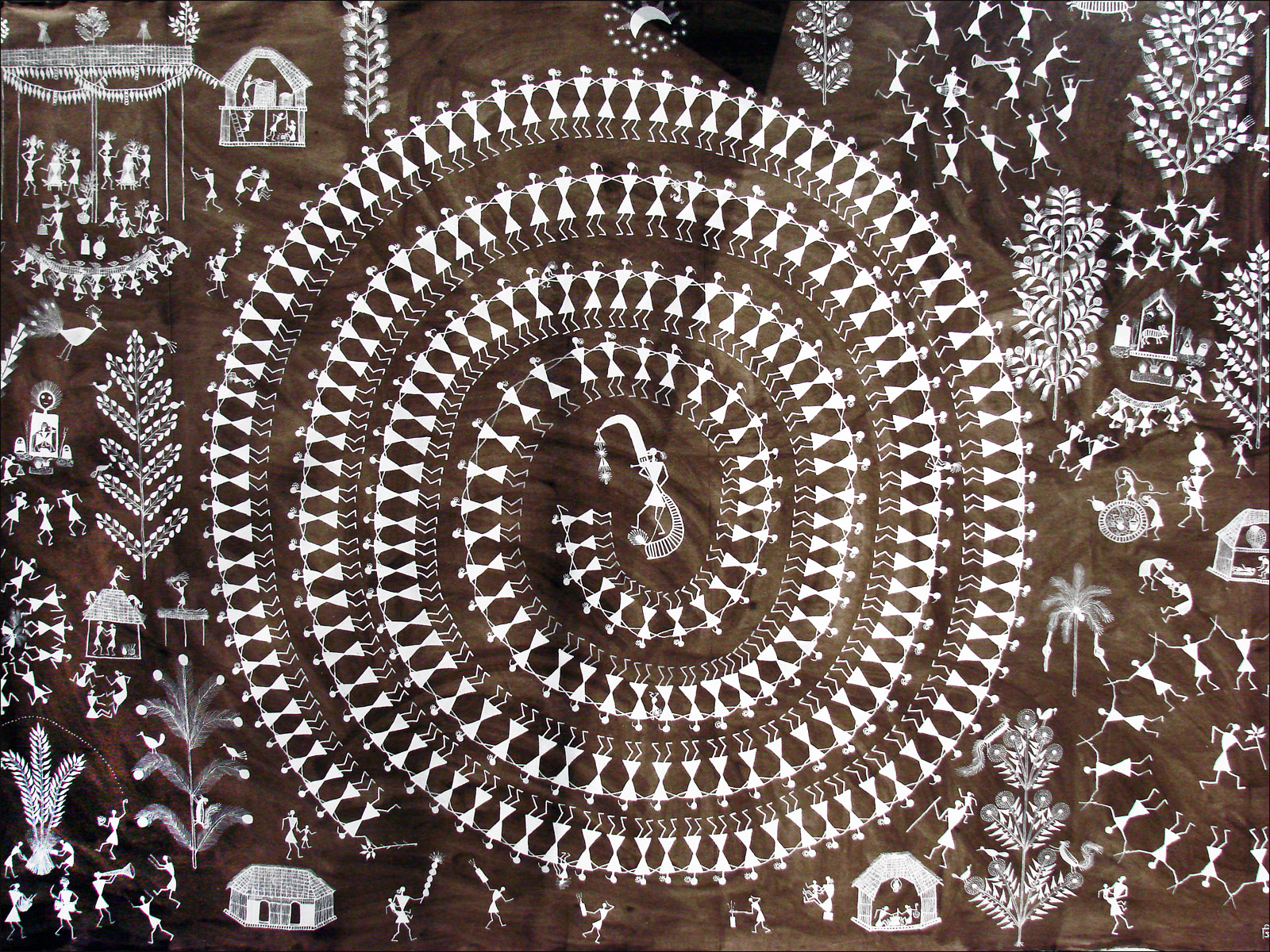 D�tail d'une oeuvre de Jivya Soma Mashe, (tribu Warli / Thane district) Danseurs Tarpa autour d'un musicien Acrylique et bouse de vache sur toile 2003 Stiftung Museum Kunst Palast, D�sseldorf Image de l'exposition "Autres Ma�tres de l'Inde, cr�ations contemporaines des Adivasi " Mus�e du Quai Branly Paris